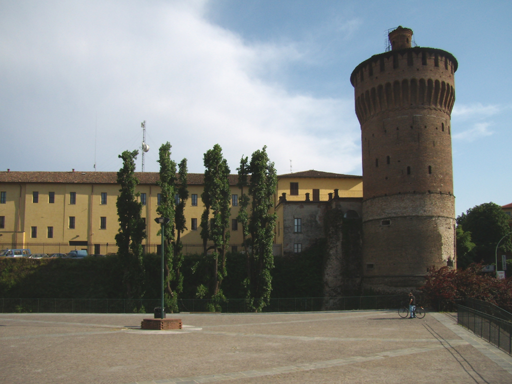 Il Castello Visconteo di Lodi e il "Torrione" visti da piazza Matteotti